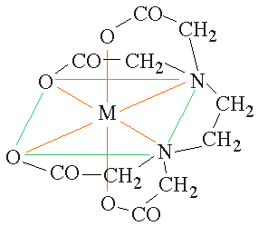 formula di struttura di un complesso EDTA-metallo disegnata da Paginazero